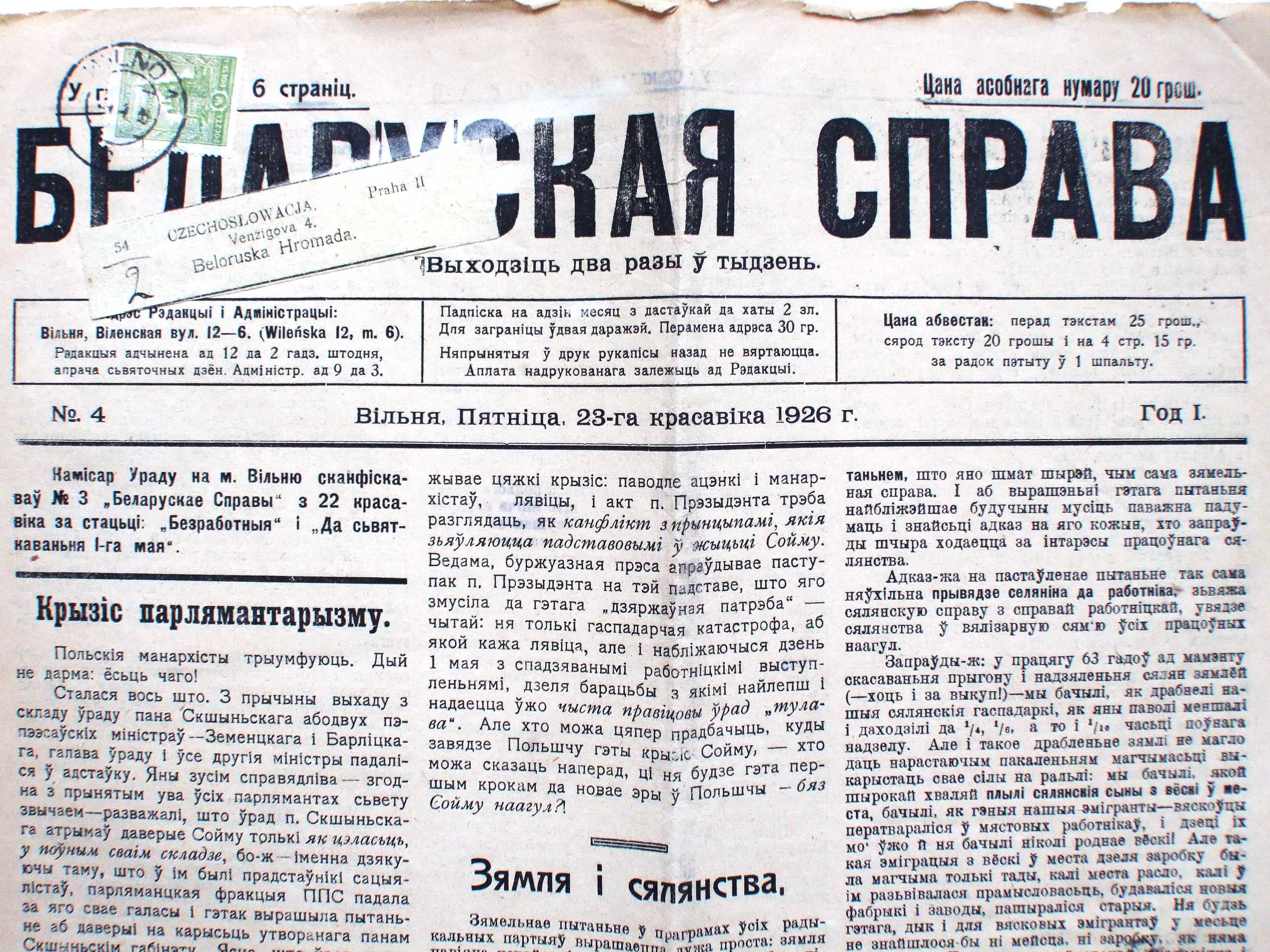 Беларуская (тарашкевіца): Газэта "Беларуская справа", №4 ад 23-04-1926. Асобнік дасылаўся зь Вільні ў Прагу да "Беларускай Грамады" (на асобніку бачны адрэса, марка і паштовы штамп). Відаць паведамленьне ад канфіскацыі папярэдняга №3 газэты.